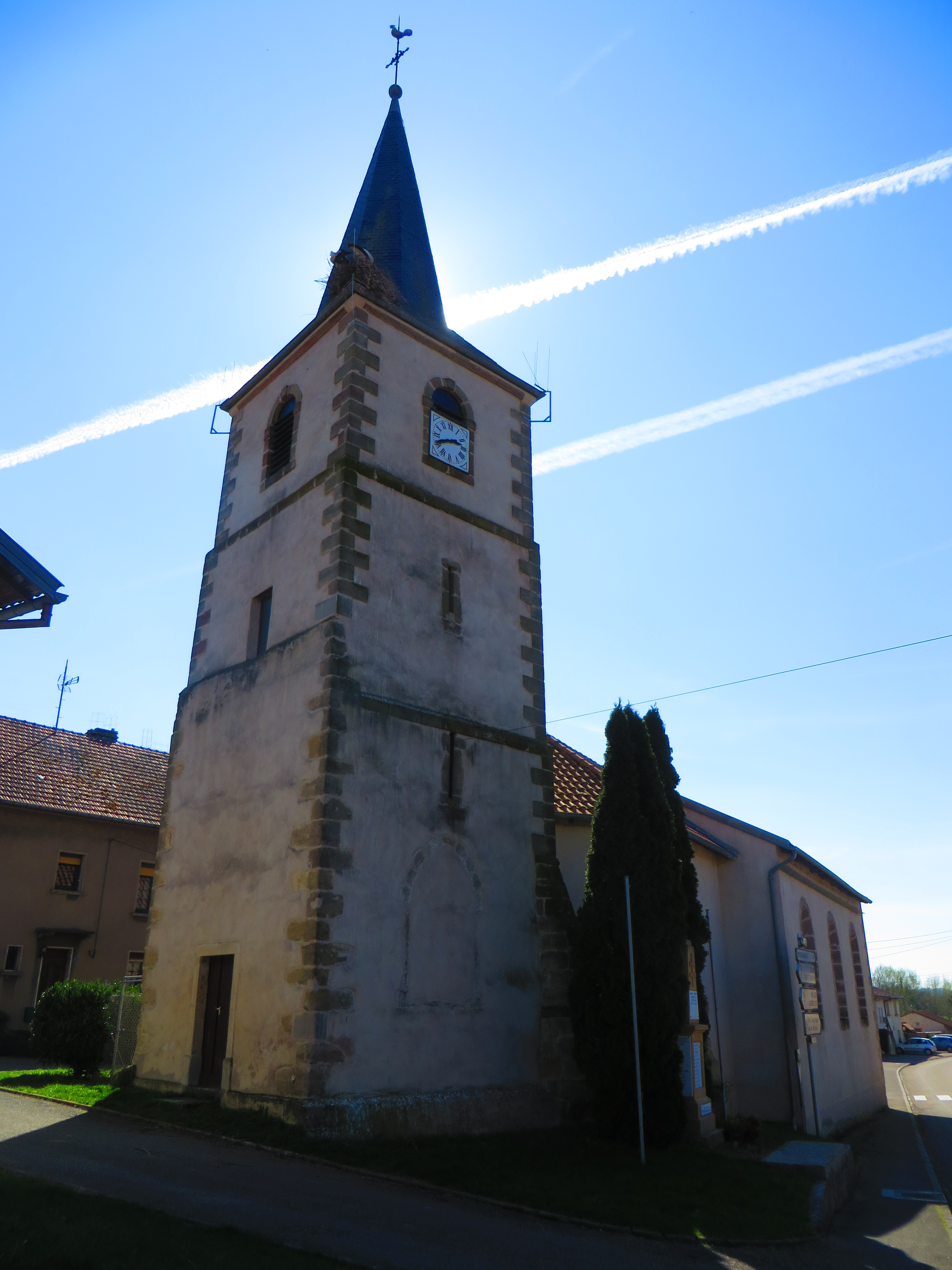 Harprich Église Saint-Denis